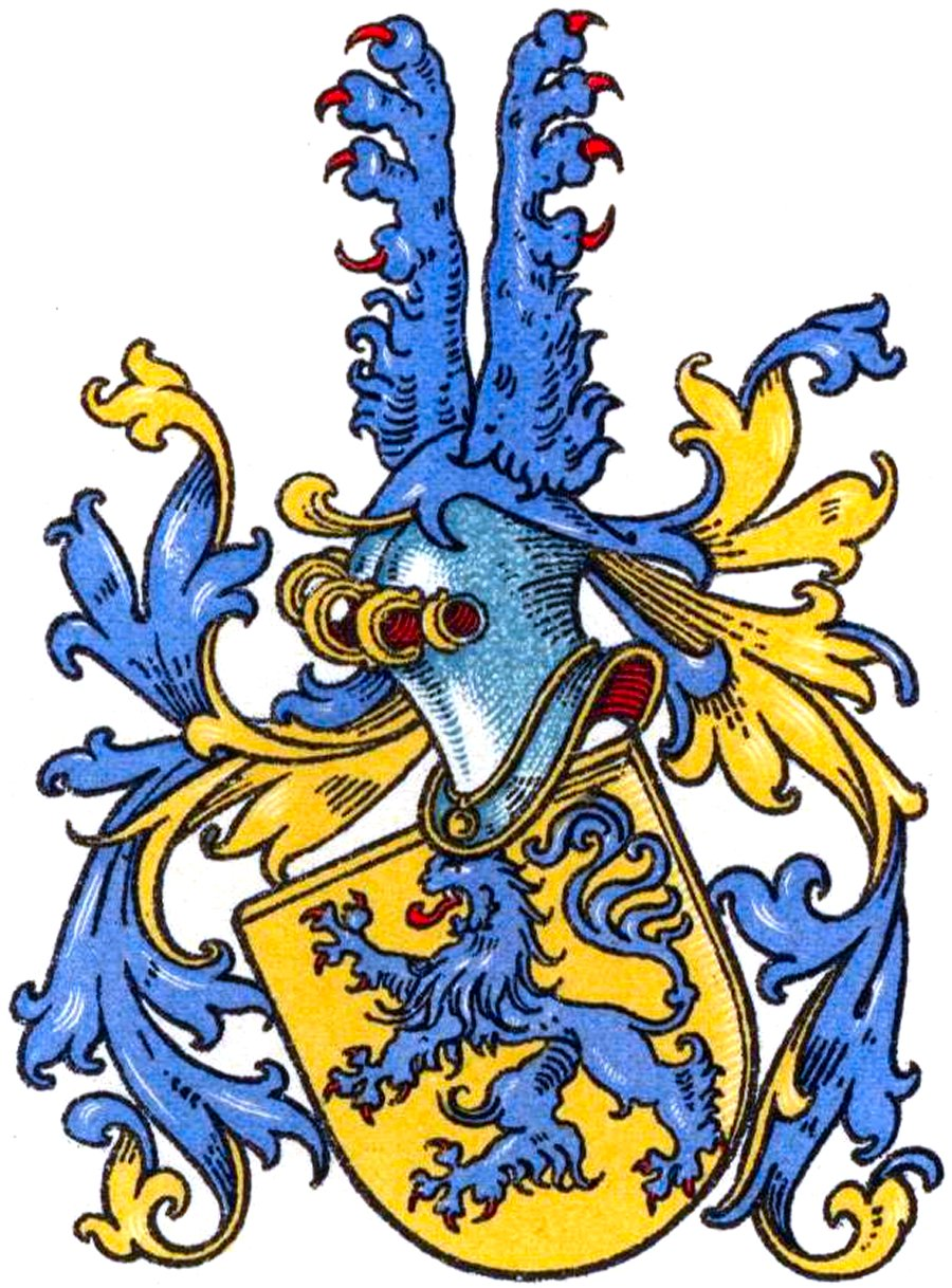 Wappen derer Grafen von Solms zu Ottenstein.